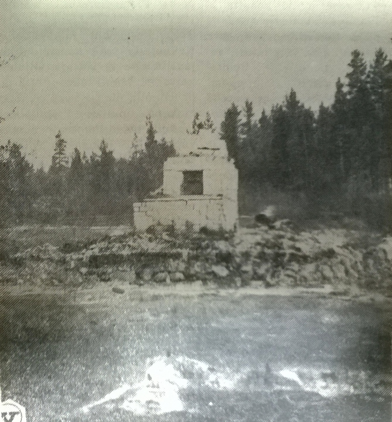 Isojoen-Honkajoen suurpalo